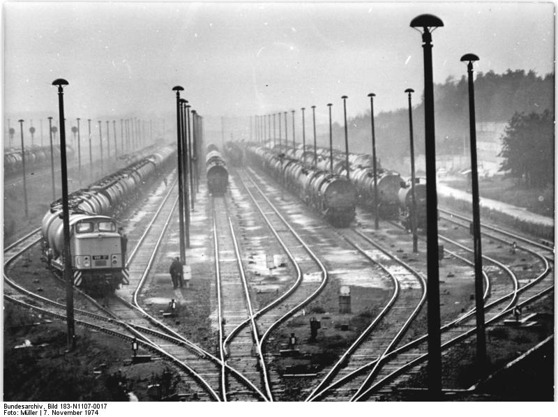 ADN-ZB/Müller/7.11.74 Bez. Frankfurt/O.: Das Petrolchemische Kombinat Schwedt stellt sich vor - Bis zu 1000 Waggons mit Erdölprodukten werden auf dem Werksbahnhof des petrolchemischen Kombinats Schwedt -Stammbetrieb- täglich abgefertigt und an die Reichsbahn übergeben. Auf nahezu 400 Bahnhöfen in der DDR und vielen Ländern Europas werden die Waggons erwartet. 8000 Werktätige des PCK Schwedt garantieren mit täglich hohen Wettbewerbsleistungen das sowjetisches Erdöl auf ökonomischste Weise verarbeitet wird.